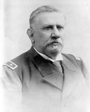 Manuel Bulnes Pinto, (Santiago; 10 de junio de 1842 – Santiago, 18 de abril de 1899). Militar y político chileno.